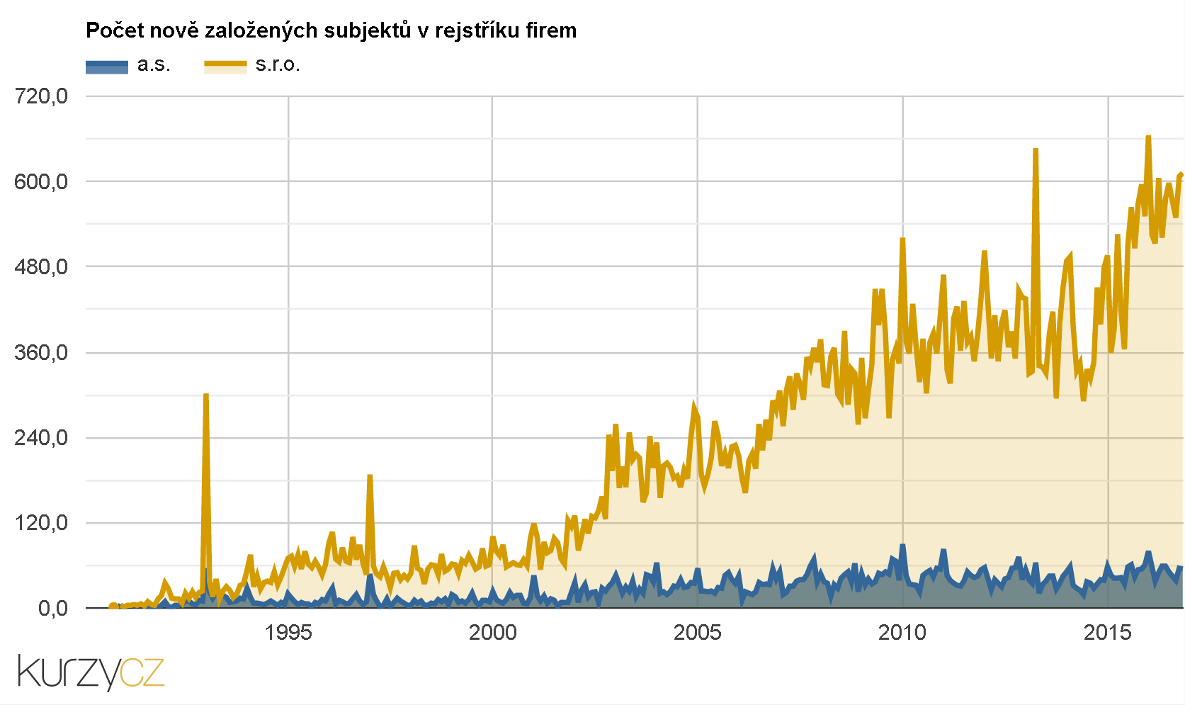 Počet nově založených obchodních společností ve Veřejném rejstříku (dříve Obchodní rejstřík) dle data od roku 1990